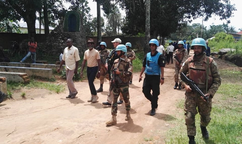 Kananga, Kasaï central, RD Congo: A la suite de l’ultimatum de huit jours donné par le Commandant Secteur de Kasaï Central aux membres de la milice Kamuina Nsapu pour déposer leurs armes, une mission d’évaluation mixte MONUSCO/Agences de l’ONU a été déployée à Tshikula dans le territoire de Dibaya pour marquer la présence de la MONUSCO, évaluer la situation sécuritaire et humanitaire dans le cadre de la restauration de l’autorité de l’Etat dans les territoires sous contrôles de la milice Kamuina Nsapu et engager le dialogue pour un processus de désarmement pacifique. Photo MONUSCO/Rosine M. Djoumessi Kananga, Kasai central, DR Congo – Following the eight-day ultimatum given by the Sector Commander of Kasai Central to Kamuina Nsapu militia members to lay down weapons, a Joint Monusco and UN Agencies assessment mission, was deployed in Tshikula, the territory of Dibaya to mark MONUSCO’s presence in the area, to assess the security and humanitarian situation as part of the restoration of the state authority in territories controlled by the Kamuina Nsapu militia and to engage in talks for a peaceful disarmament process. Photo MONUSCO/Rosine M. Djoumessi